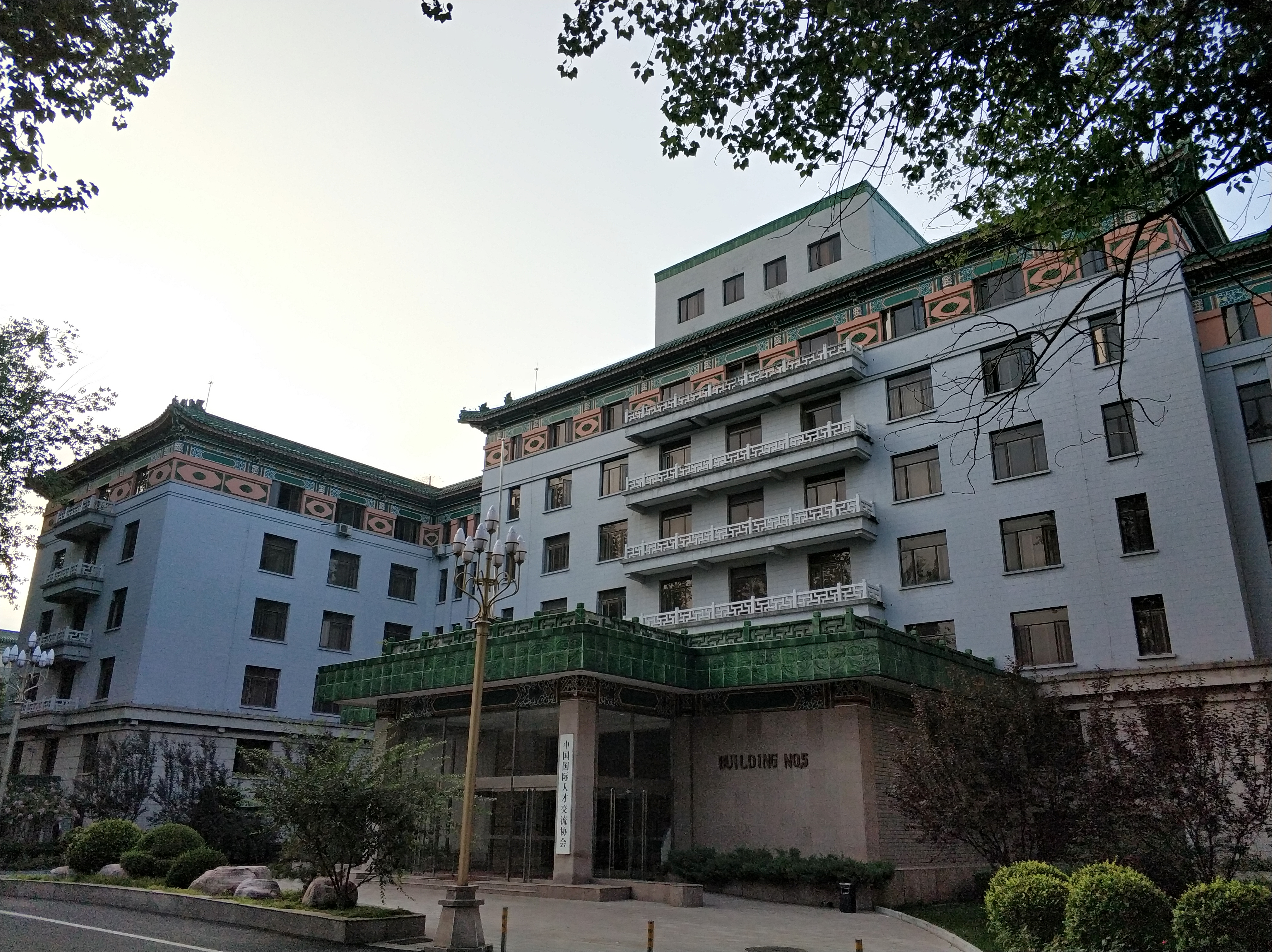 中文（中国大陆）: 北京友谊宾馆